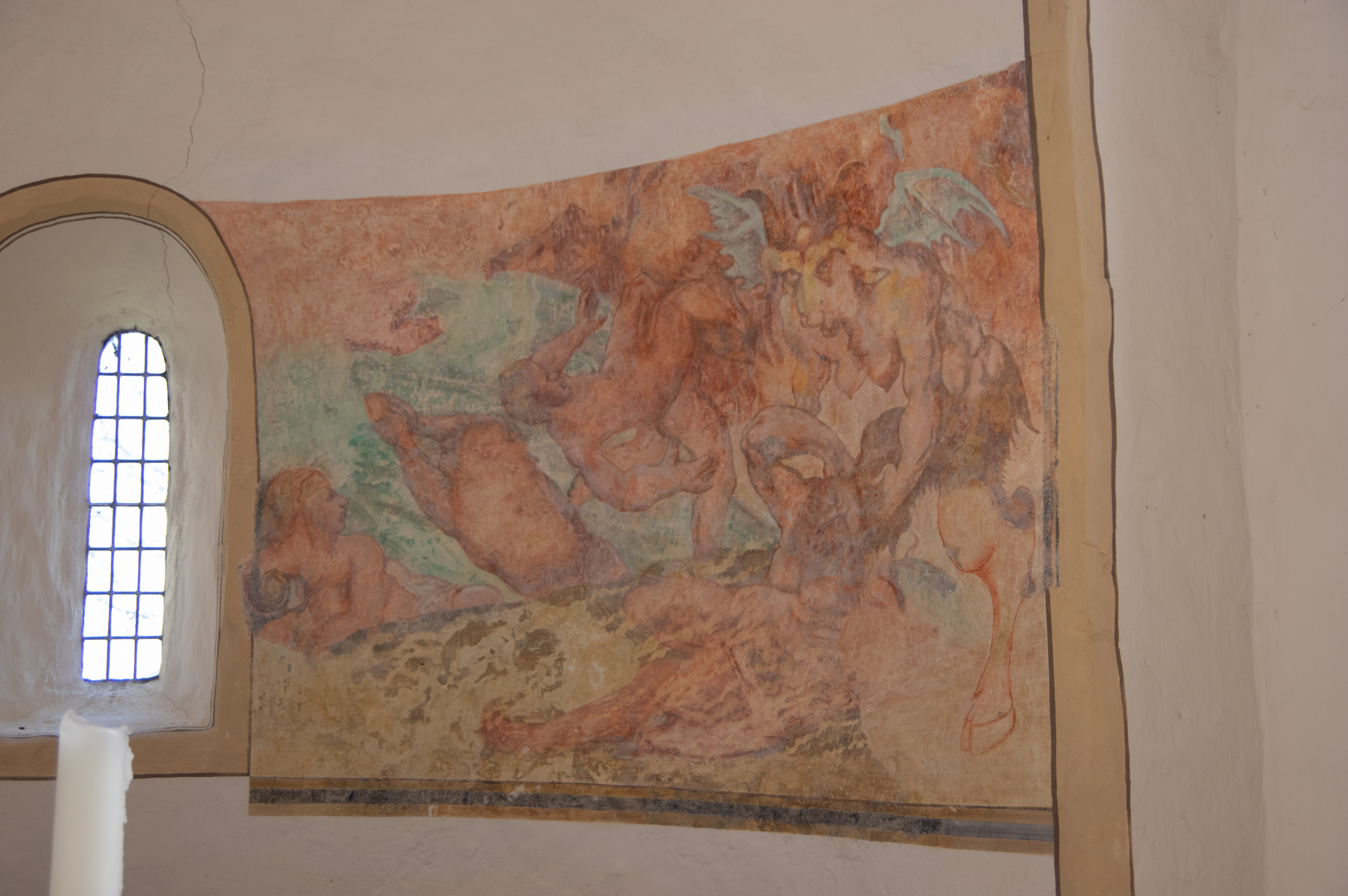 Bad Belzig, Ortsteil Lübnitz in Brandenburg. Die Kirche steht unter Denkmalschutz.